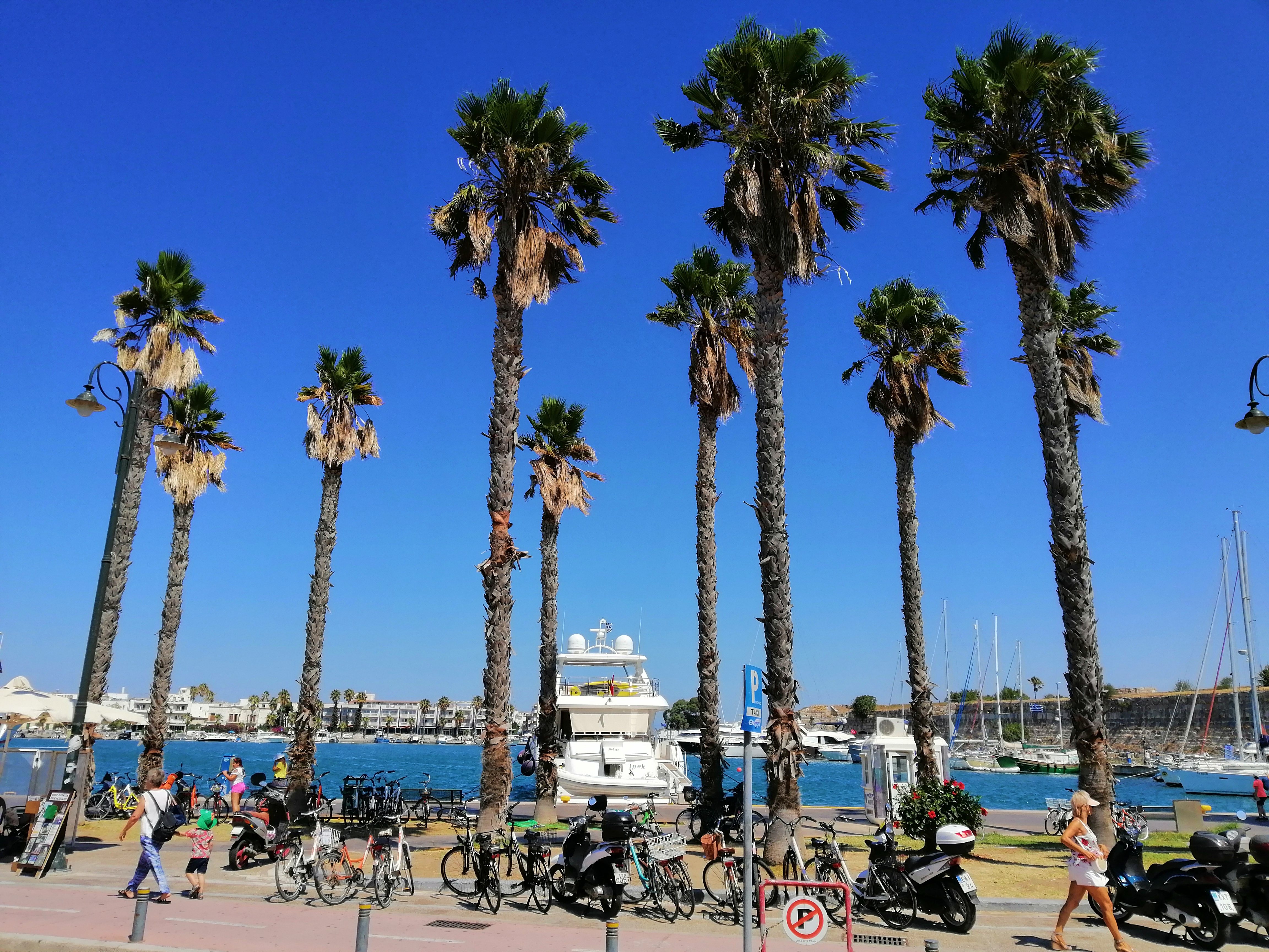 Haven van Kos (2019)